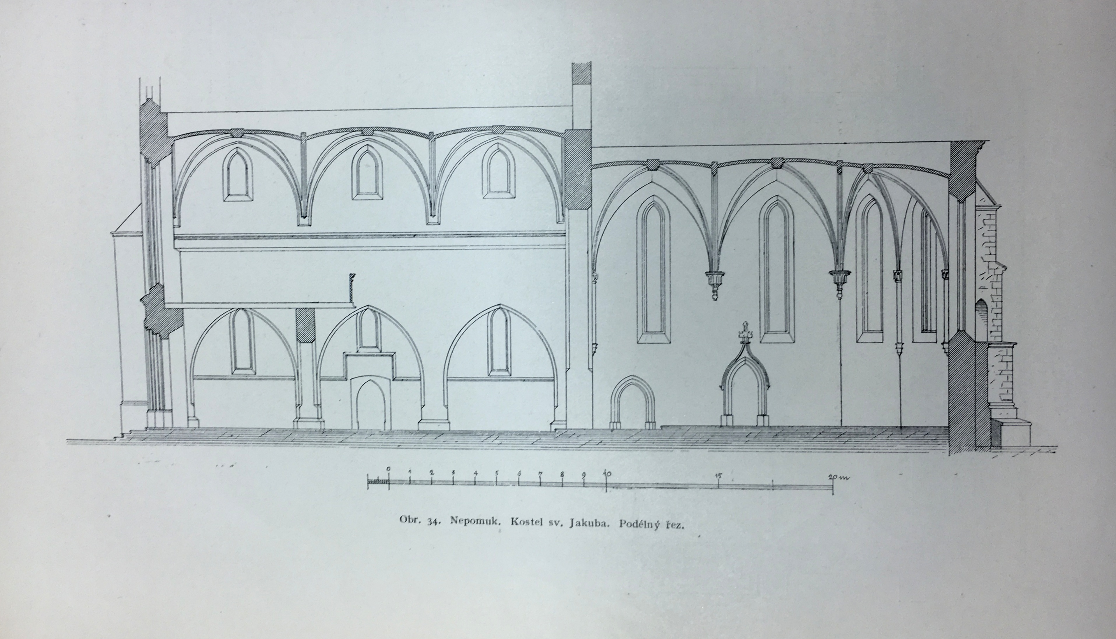 Kostel svatého Jakuba v Nepomuku, řez